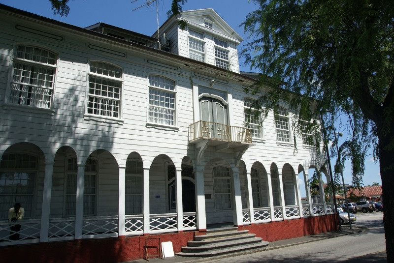 Onafhankelijkheidsplein 2, Paramaribo, Suriname